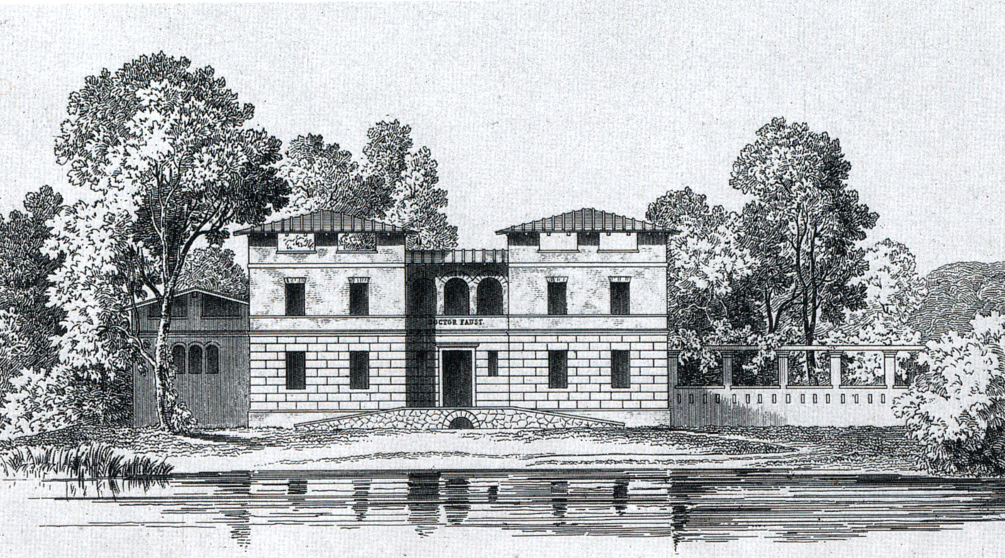 Das Fährpächterhaus/Wirtshaus zum Dr. Faust an der Sacrower Fährstelle